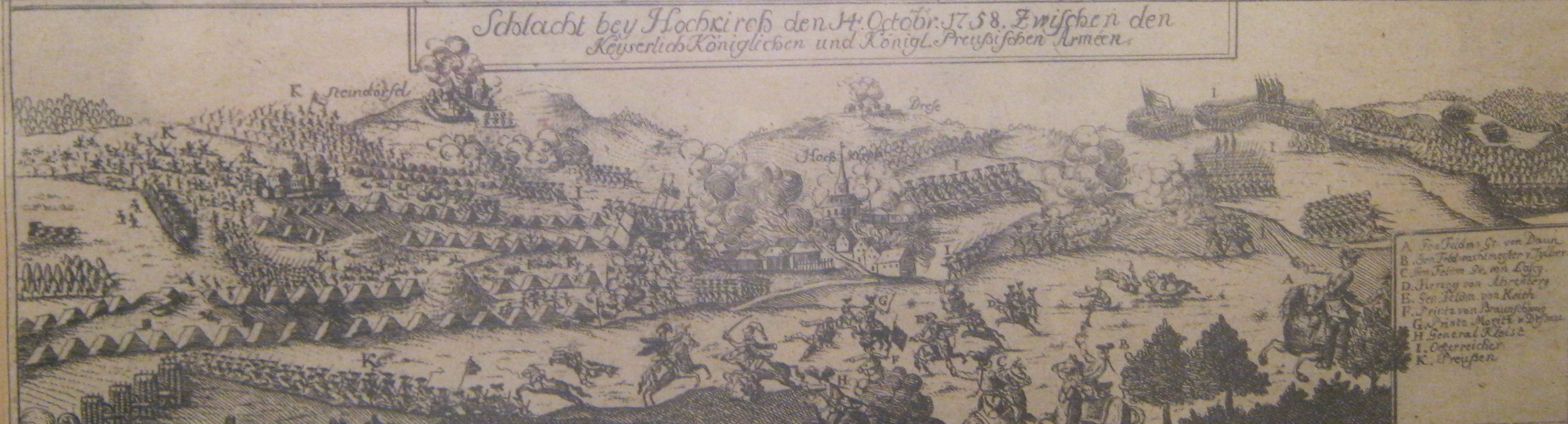 anoniem ets 1760